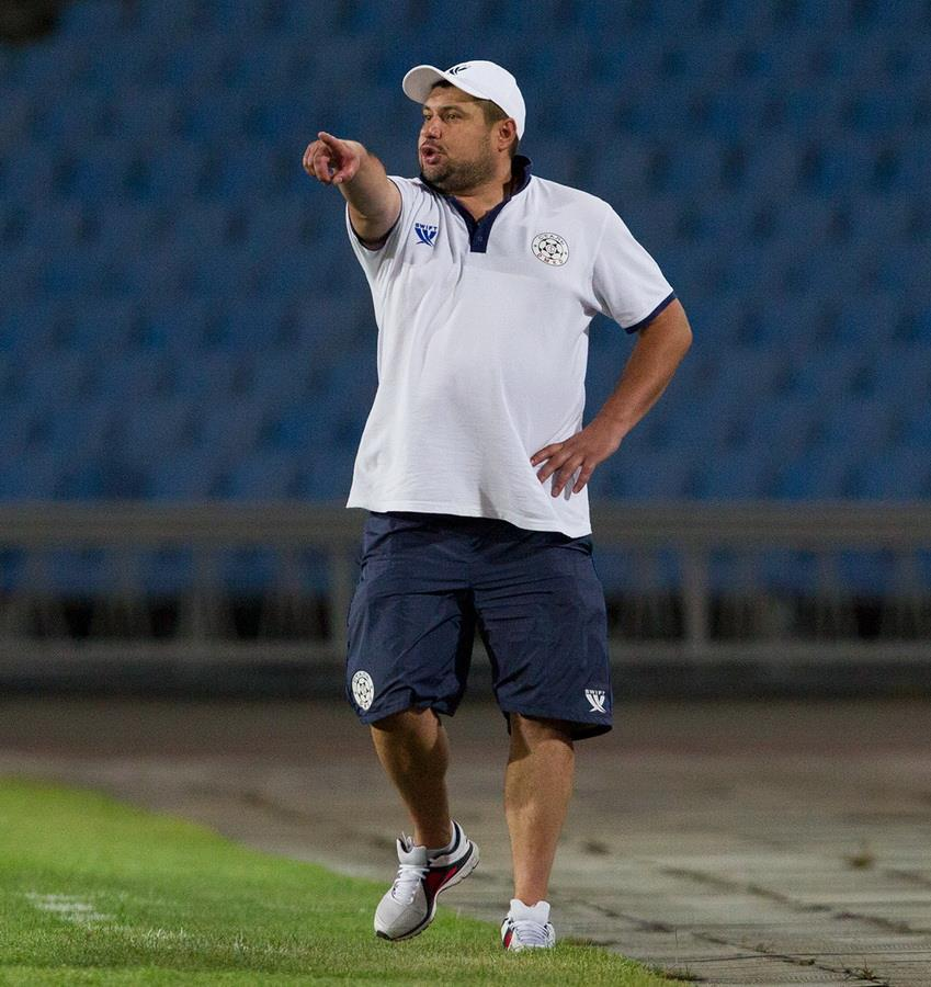 Володимир Мазяр - тренер Сталі (Дніпродзержинськ)